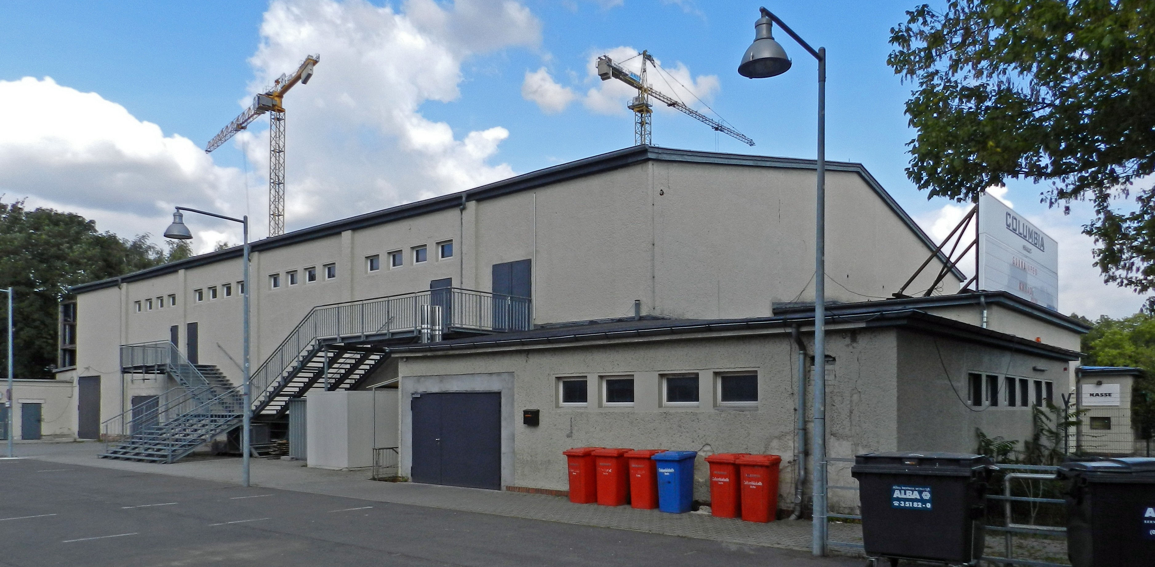 Ehemalige Sporthalle der Amerikanischen Aliierten in Berlin am Columbiadamm, heute Konzerthalle (Columbiahalle, C-Halle).